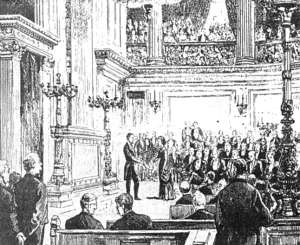 Die erste Studentin Norwegens, Cecilie Thoresen, wird am 8. September 1882 in Kristiania (Oslo) immatrikuliert